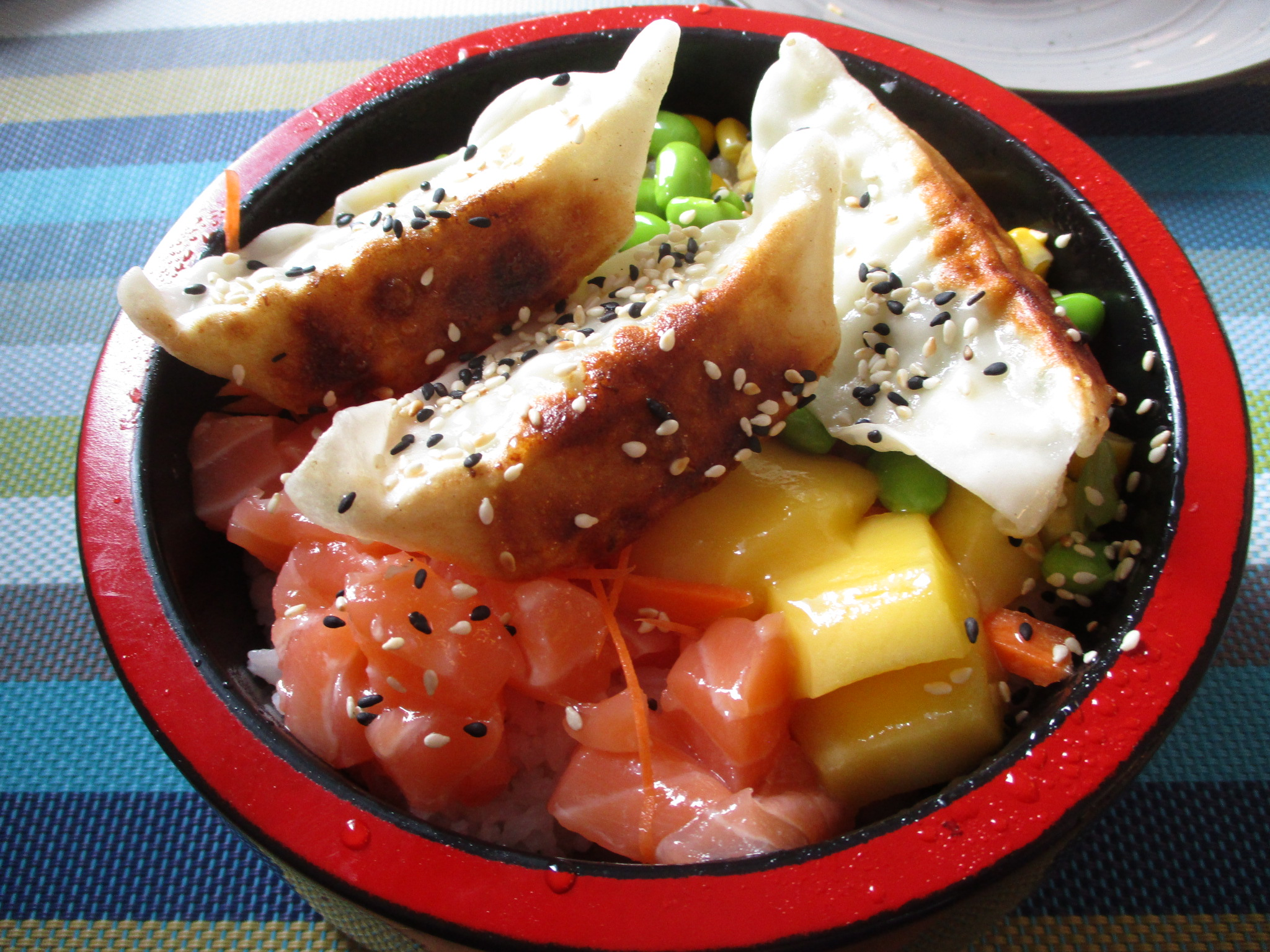 Chirashizushi : saumon, ravioli jiaozi, mangue, edamame, carotte, maïs,riz